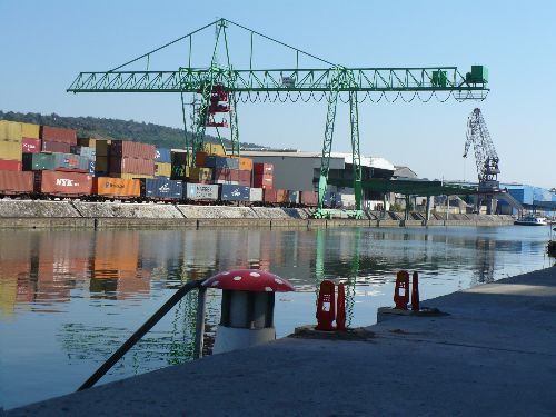 Stuttgarter Neckarhafen/harbour